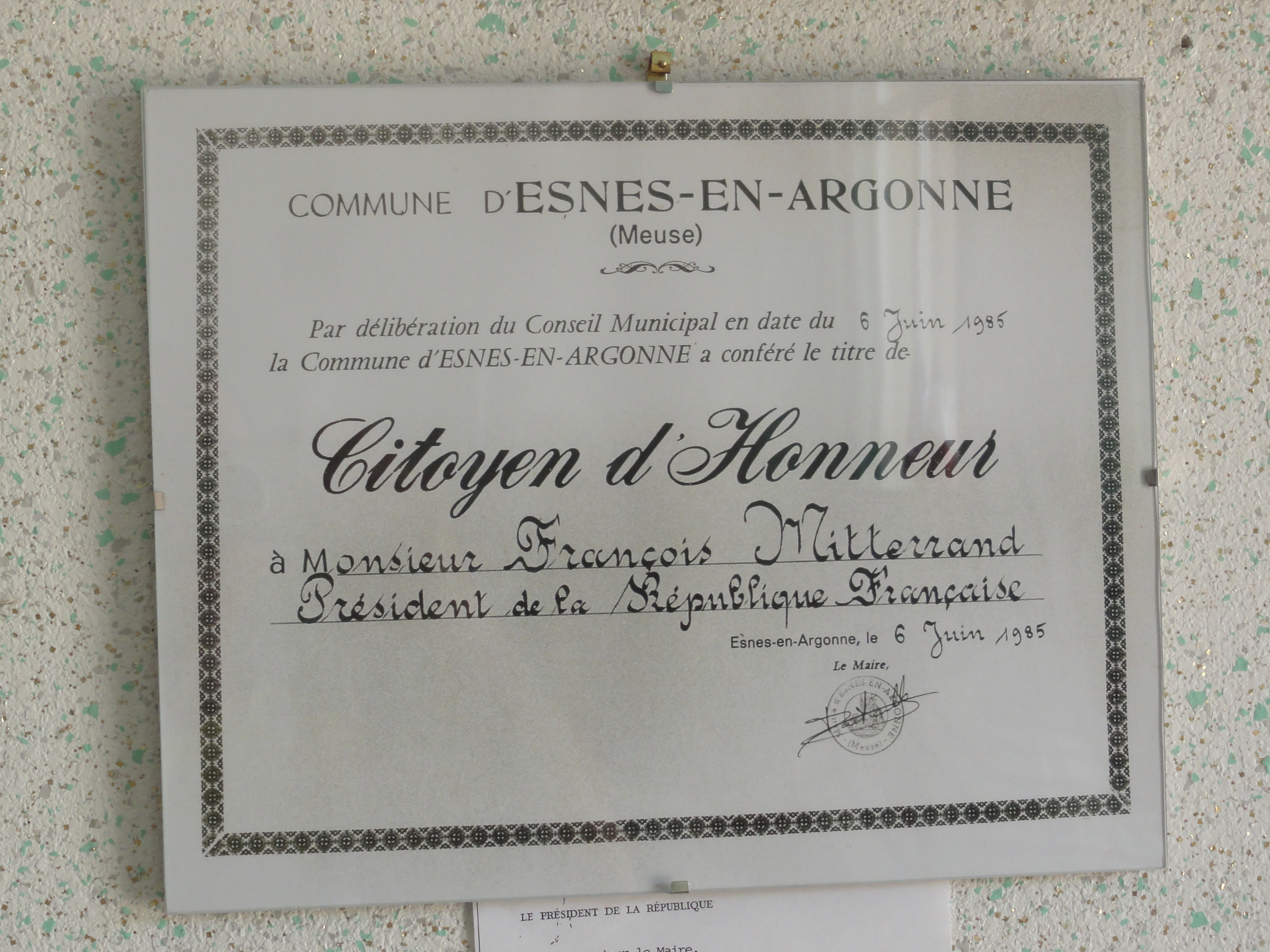 Esnes-en-Argonne (Meuse) exposition 2015, François Mitterrand citoyen d' honneur